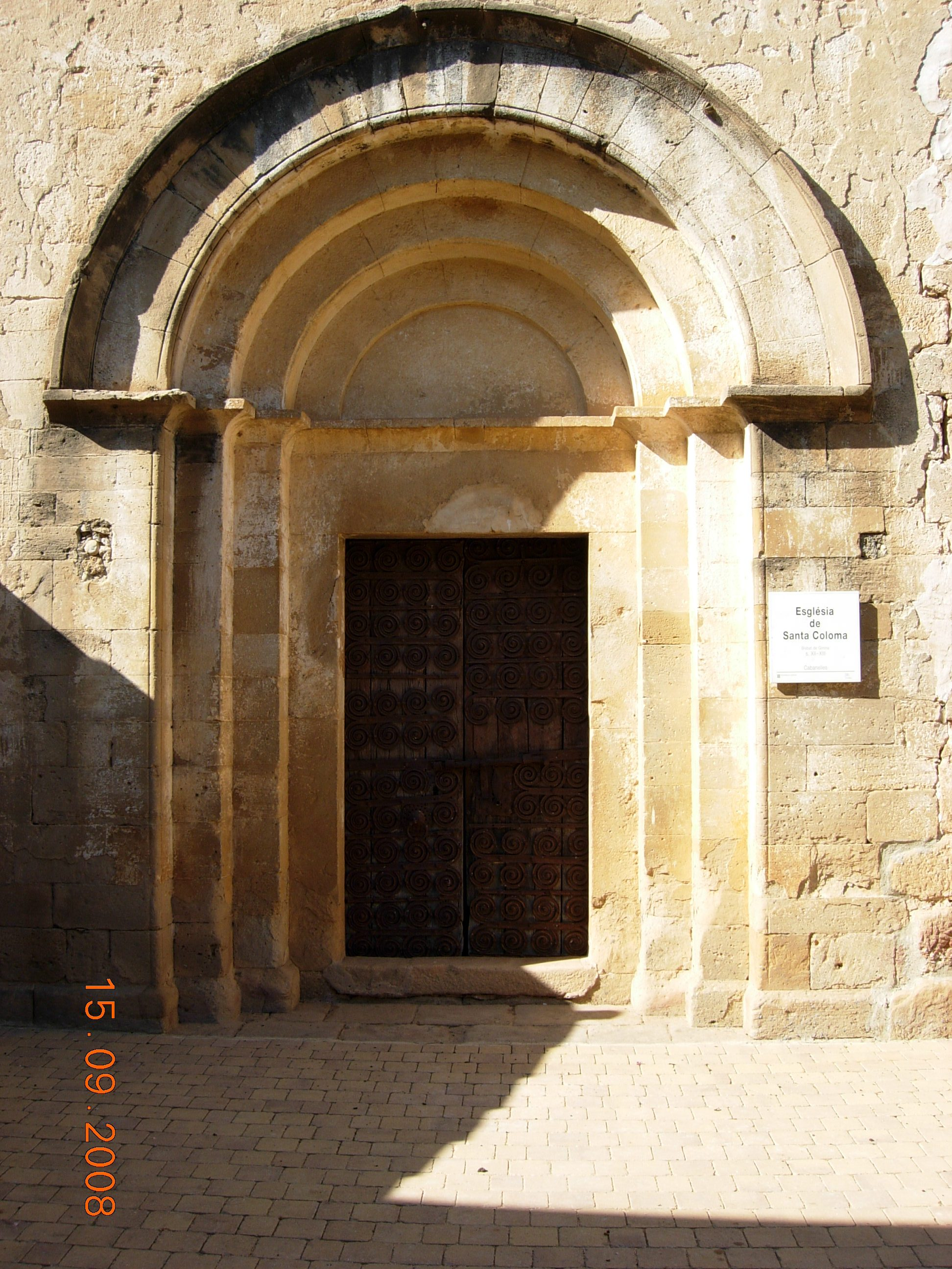 església Sta Coloma de Cabanelles